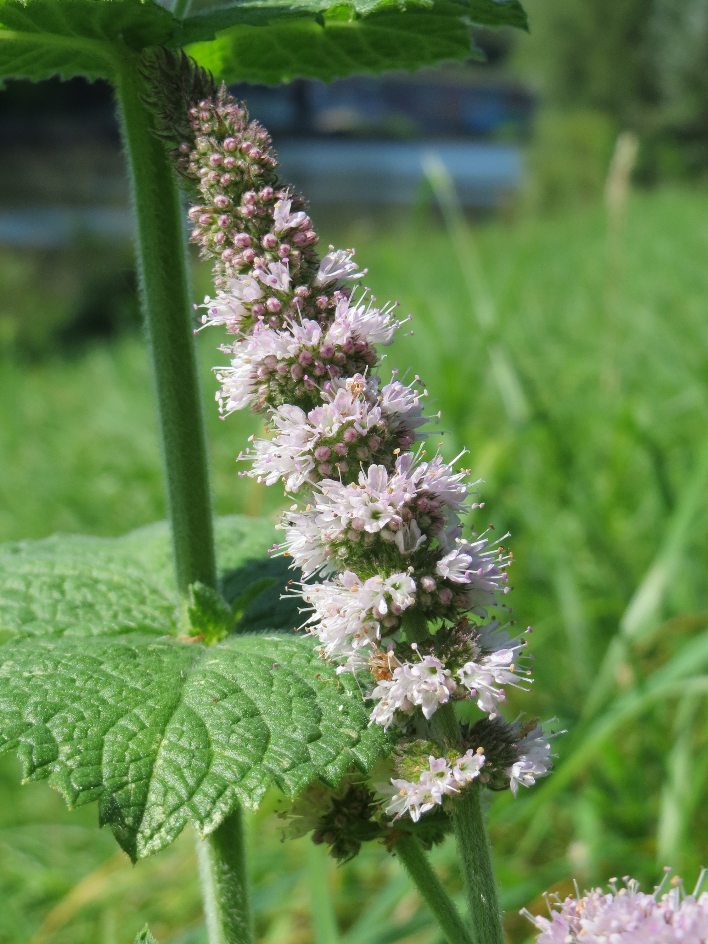 Rundblättrige Minze (Mentha suaveolens) an der Saar in Saarbrücken